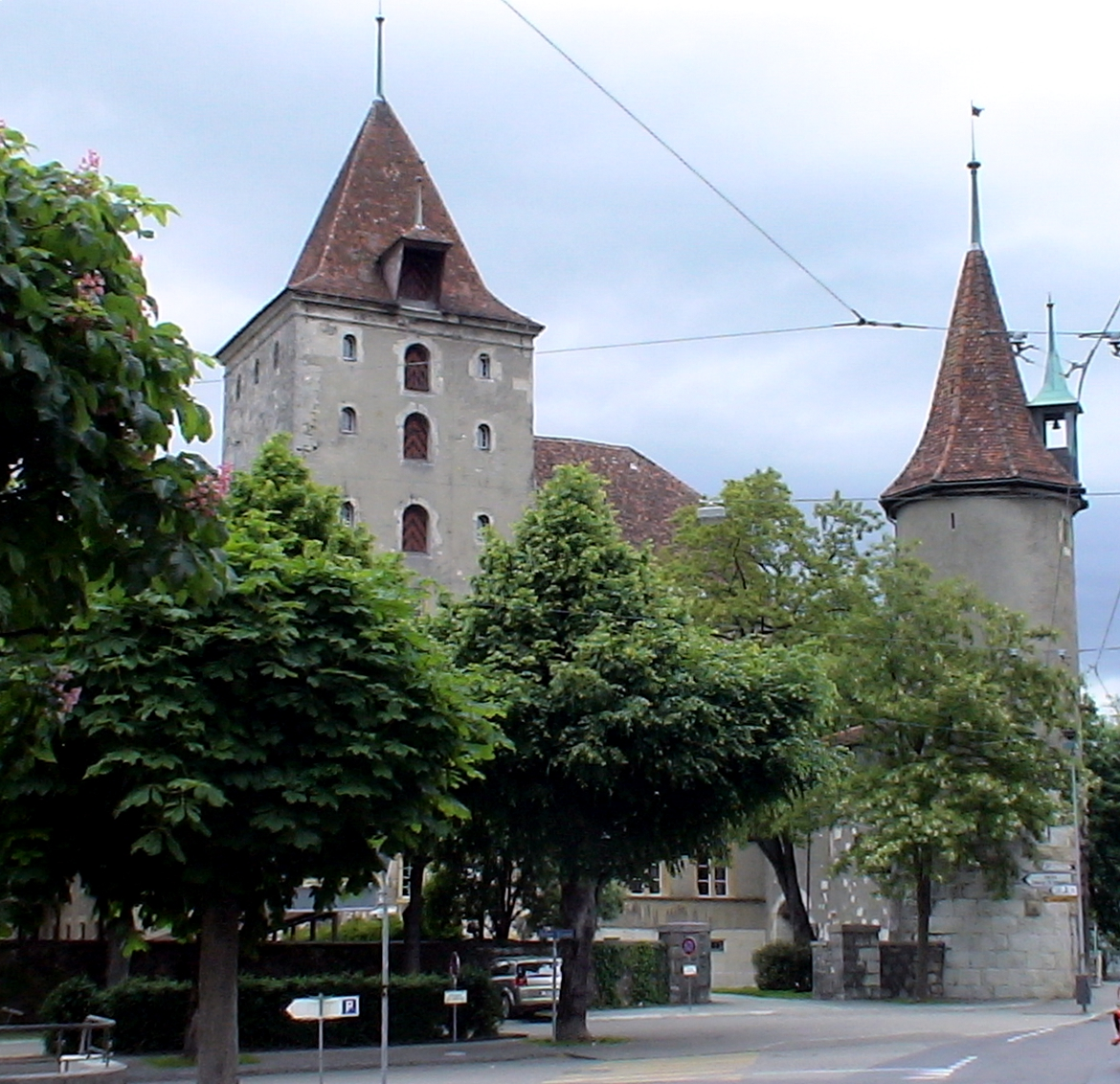 Schloss Nidau Blick von Westen